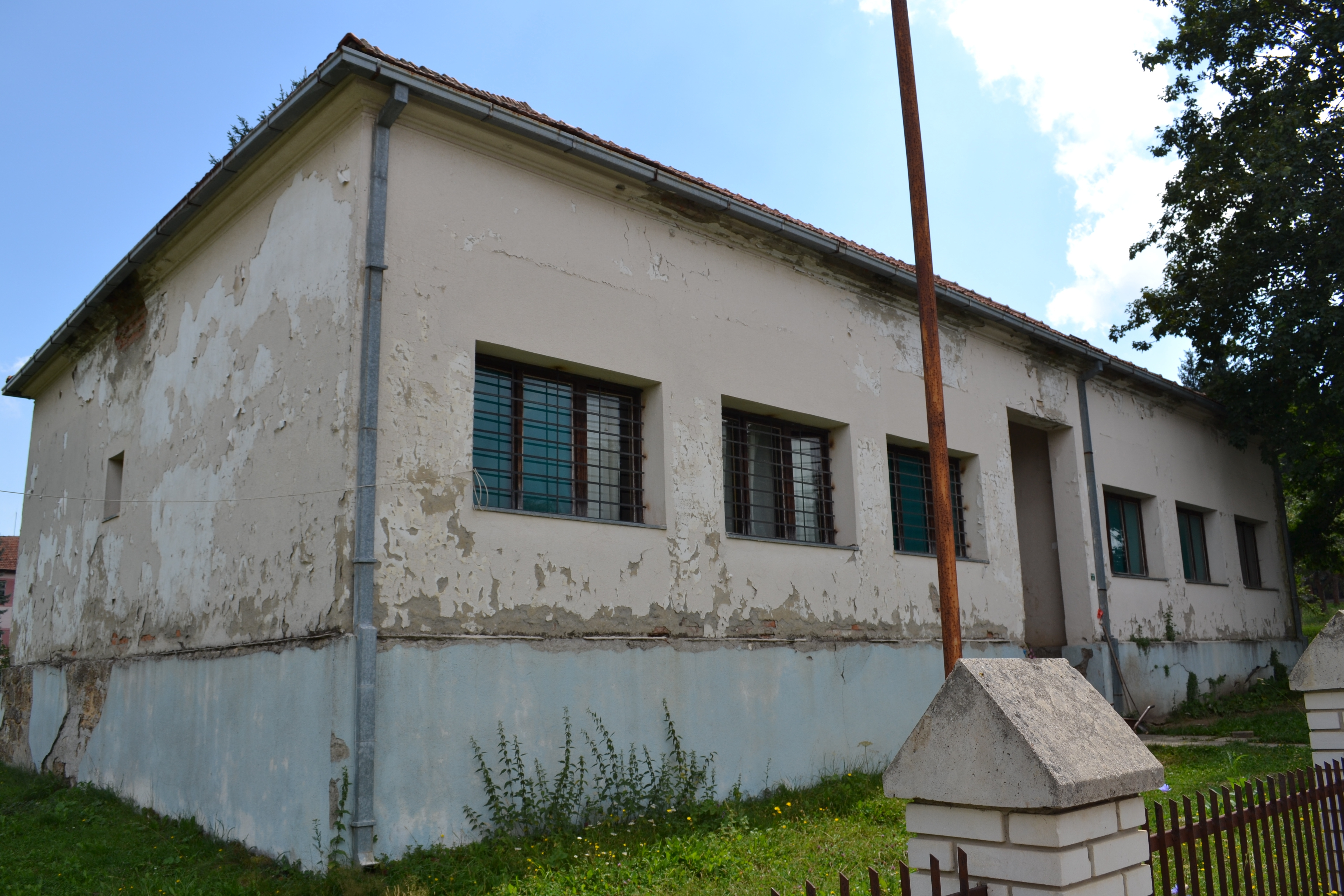 OŠ Milan Vučićević Zverac Bratljevo, stara